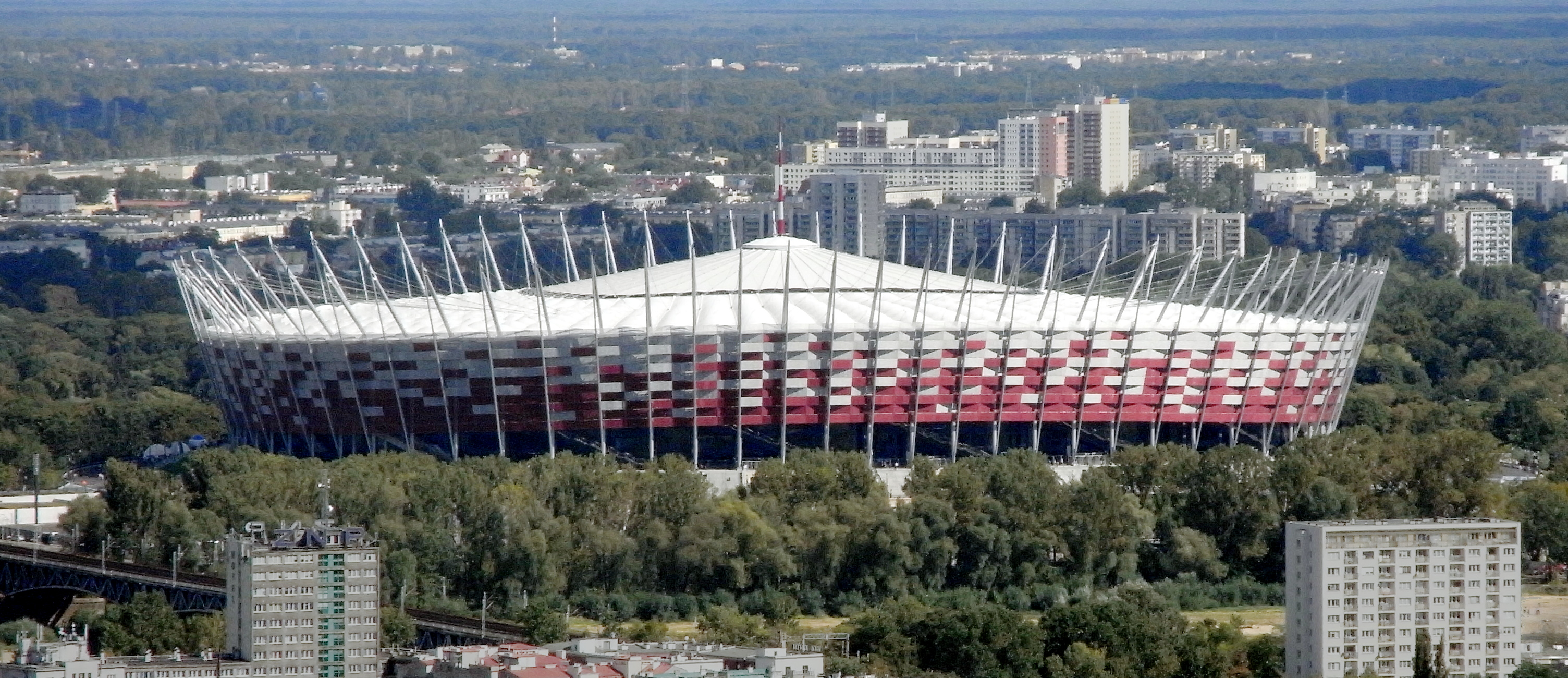 Das Nationalstadion in Warschau, vom Kulturpalast aus gesehen.